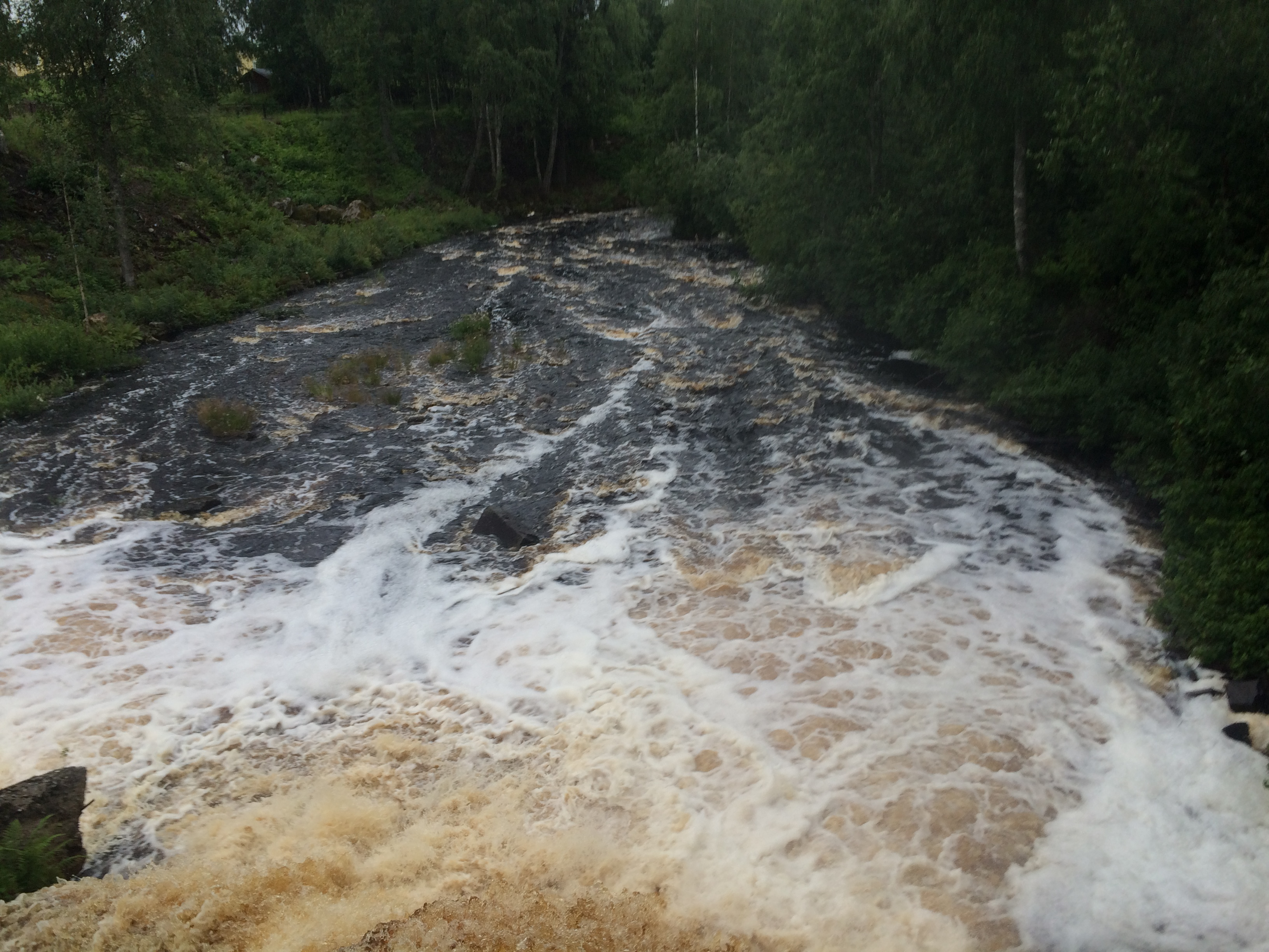 Юуванйоки